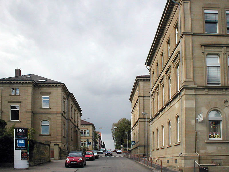 Schul- und Behördenviertel in Eppingen, erbaut 1859-1910. Im Ensemble mit der gleichaltrigen ev. Kirche ein einmaliges neoklassizistisches Viertel im weiten Umkreis.